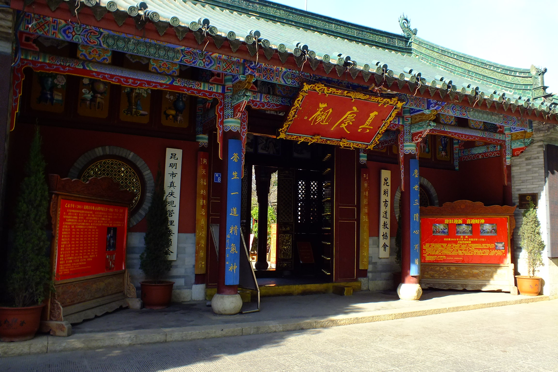 真庆观（真慶観）山門 中国云南省昆明市盘龙区拓东路82号